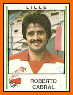 Roberto Cabral en Lille